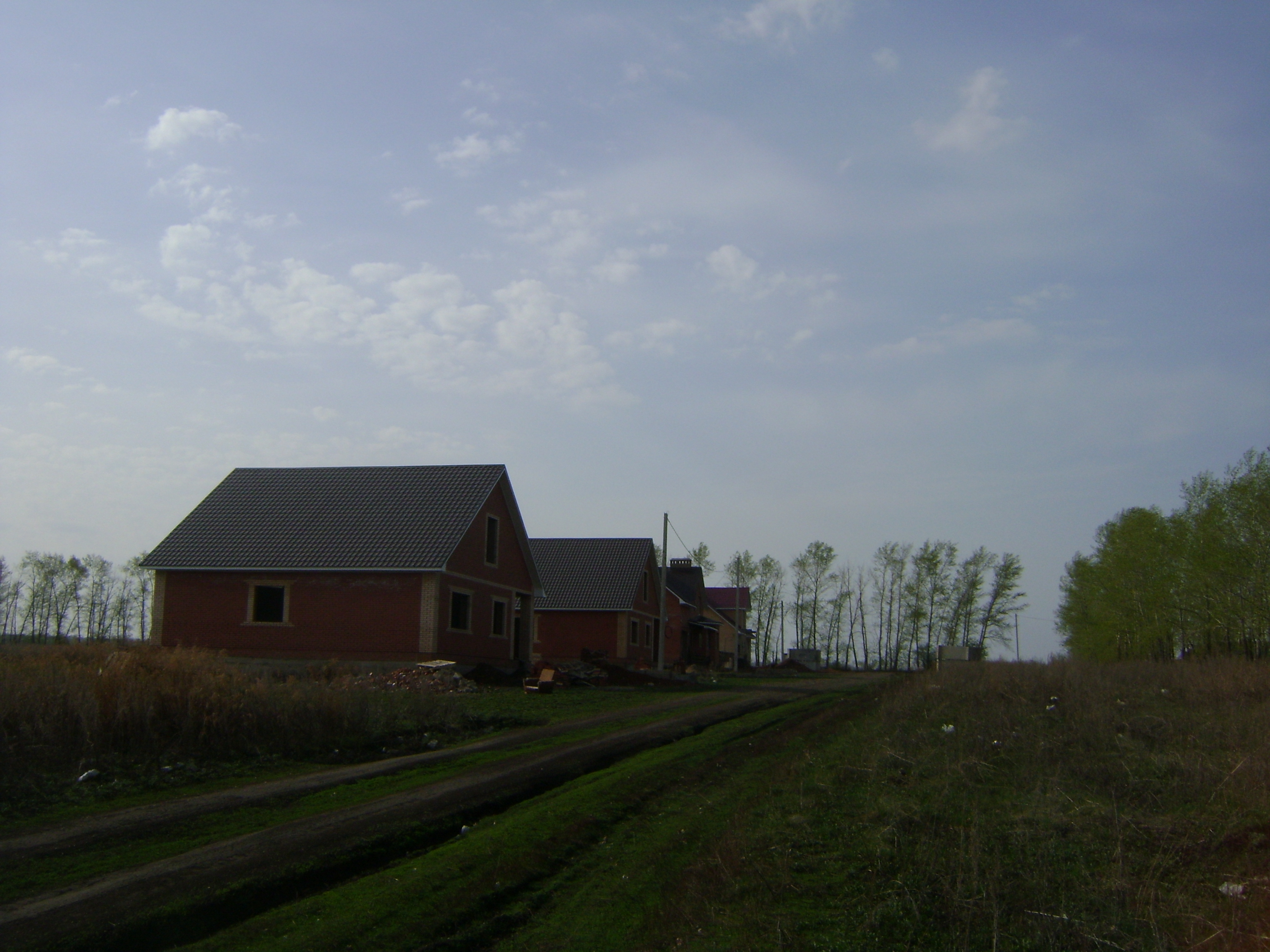 Первые коробки домов в микрорайоне Юрматы-2 (Ишимбай)